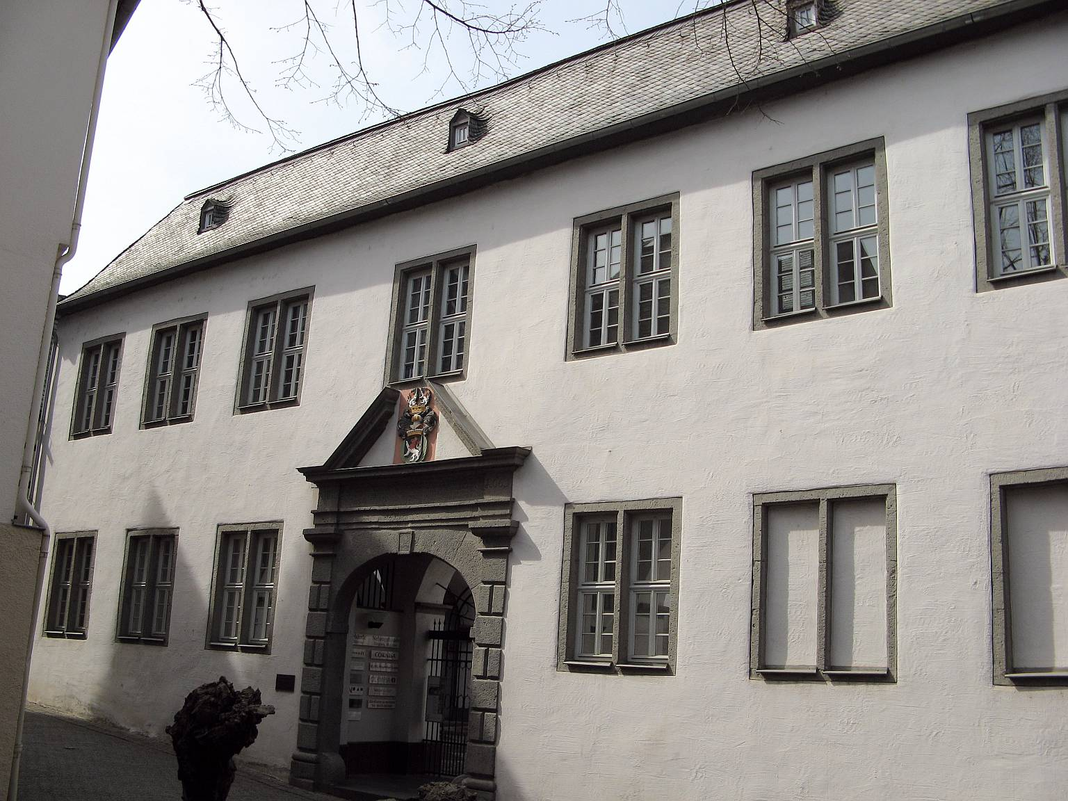 Hof der Grafen von Walderdorff in Limburg an der Lahn, Hessen, Germany